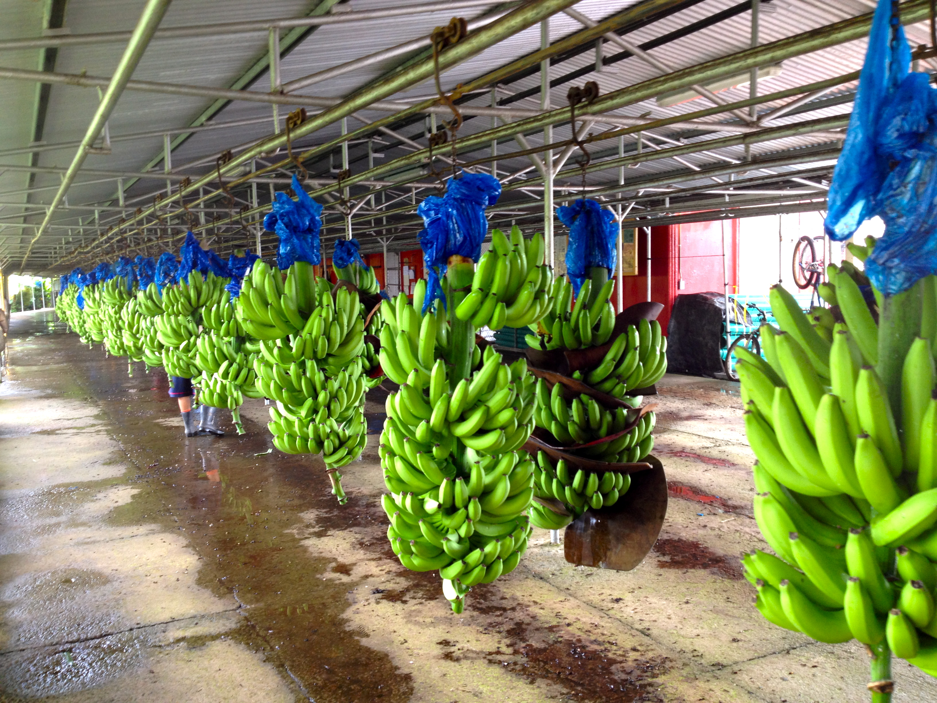 Central de tratamiento de bananos en Limón, Costa Rica.